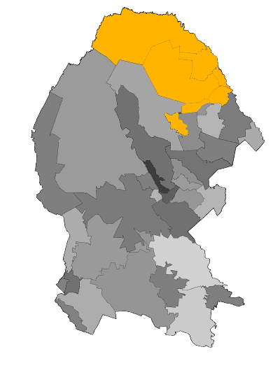 Distrito 1 Federal en Coahuila